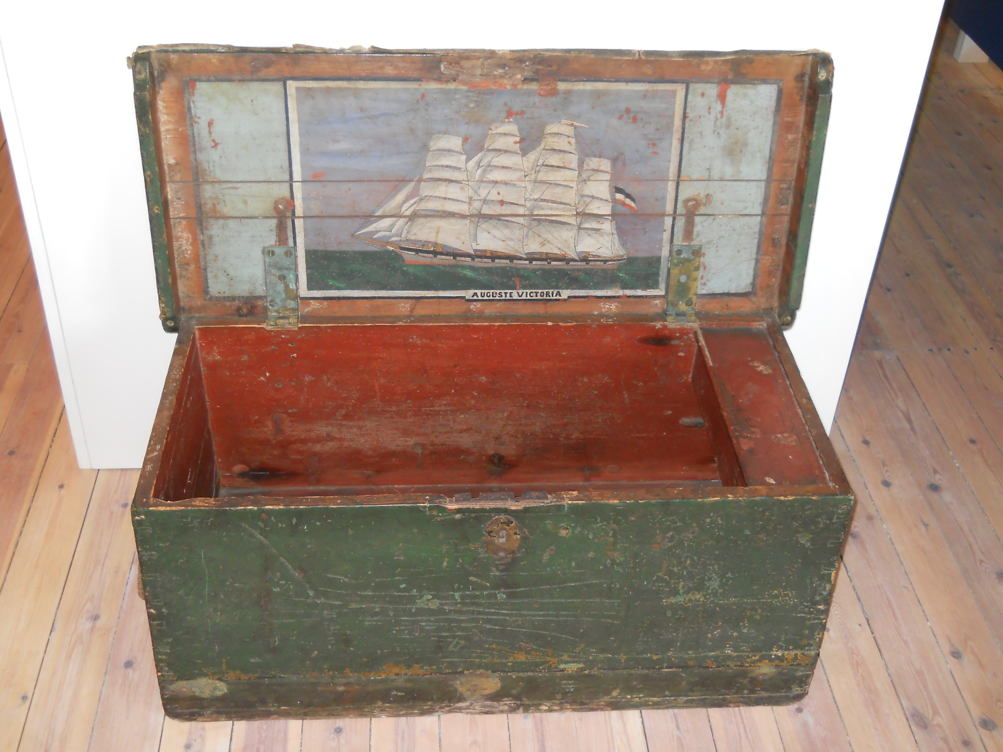 Gesamtansicht mit offenem Deckel